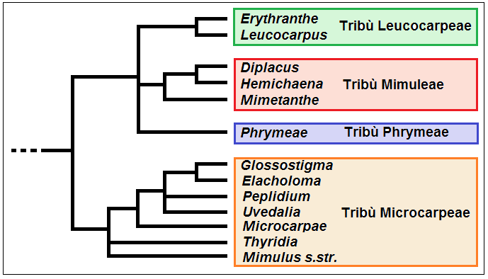 Phrymaceae - Cladogramma della famiglia